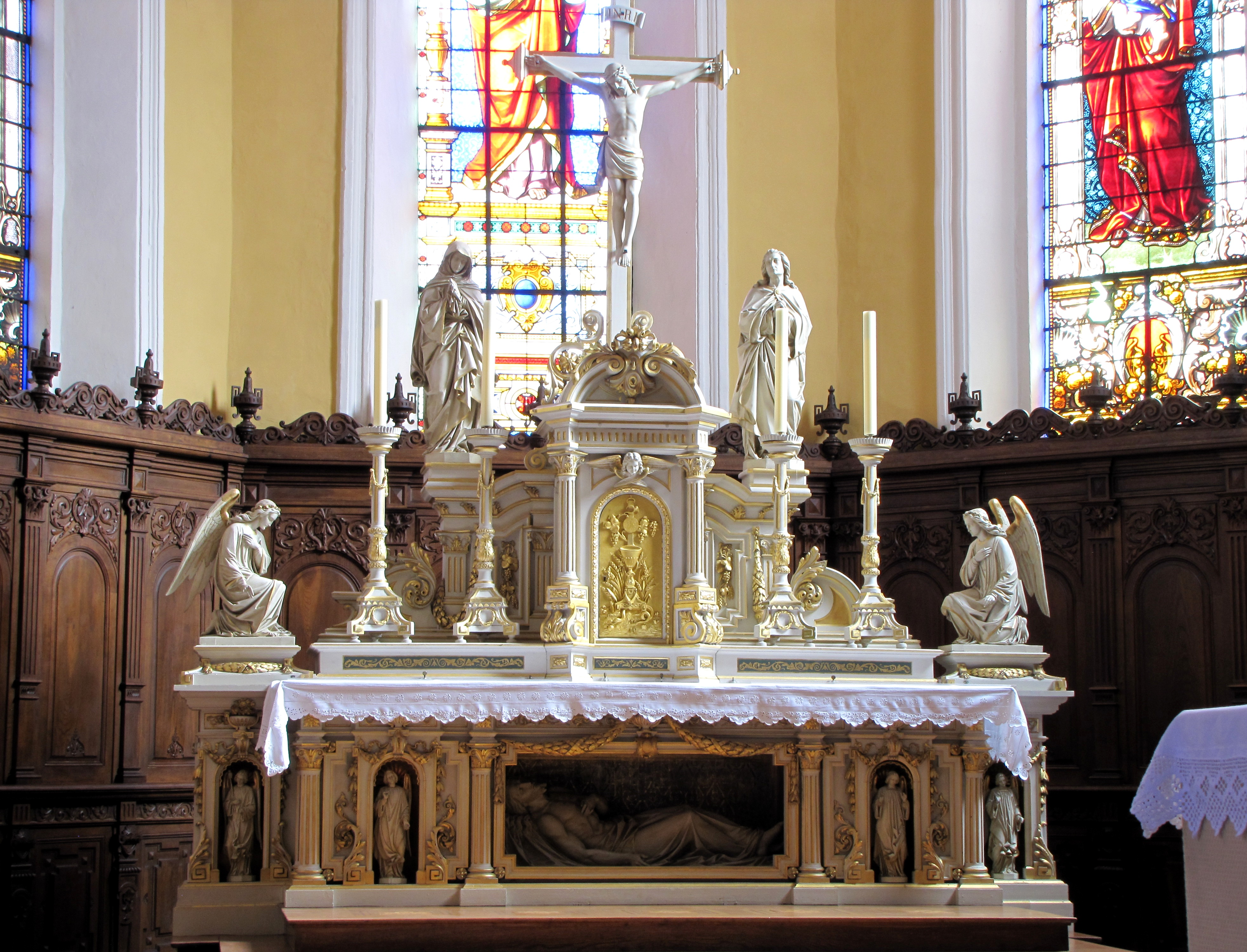 Alsace, Haut-Rhin, Église Saints-Pierre-et-Paul (XIIIe-XIXe) d'Eguisheim (PA00085415, IA68000505). Maître-autel (1877)